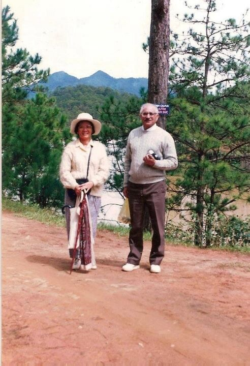 Dr. G.D Alam (right)